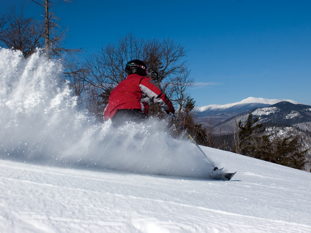 skiing at attitash